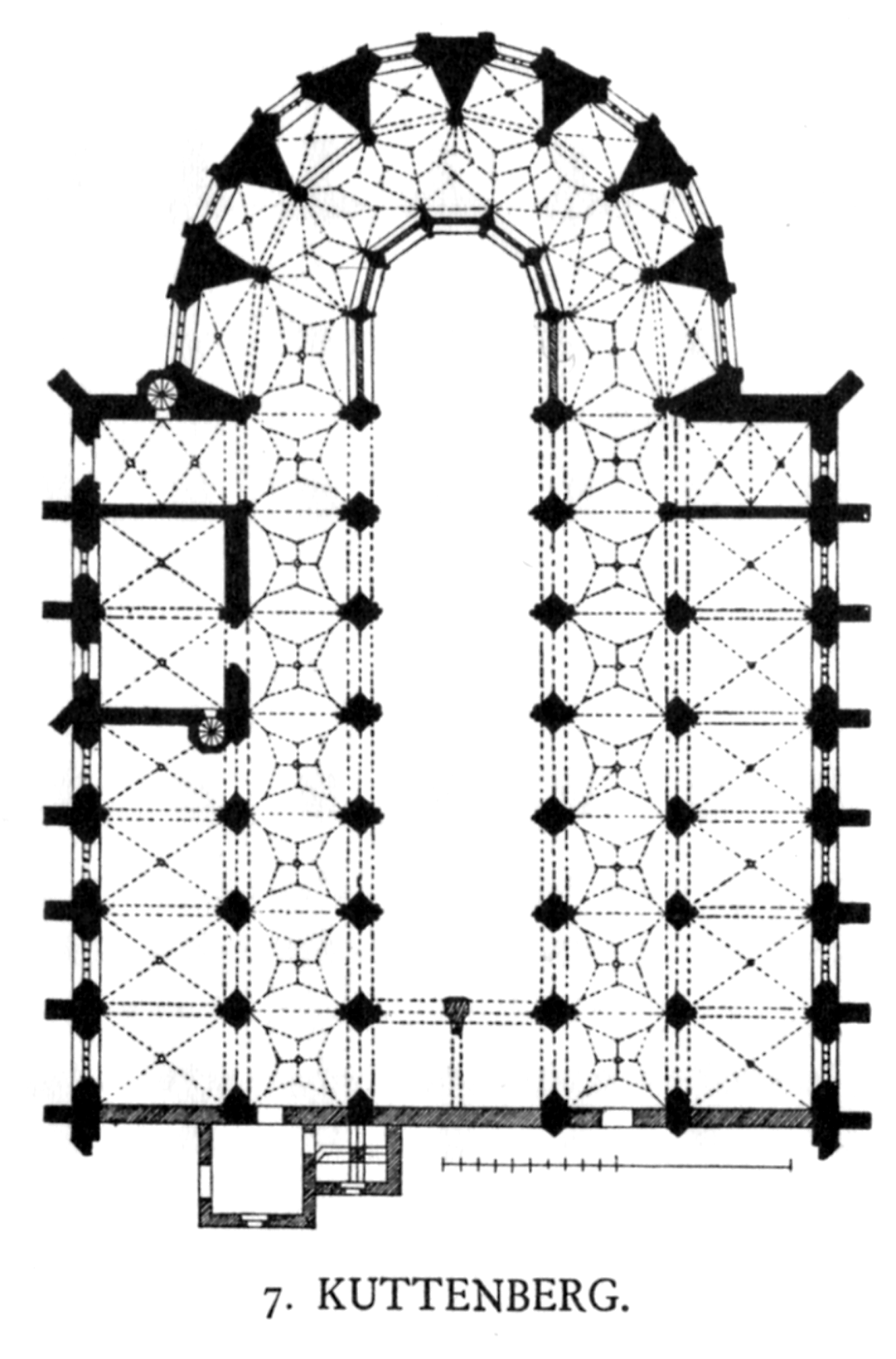 St. Barbara Church in Kutná Hora/Kuttenberg